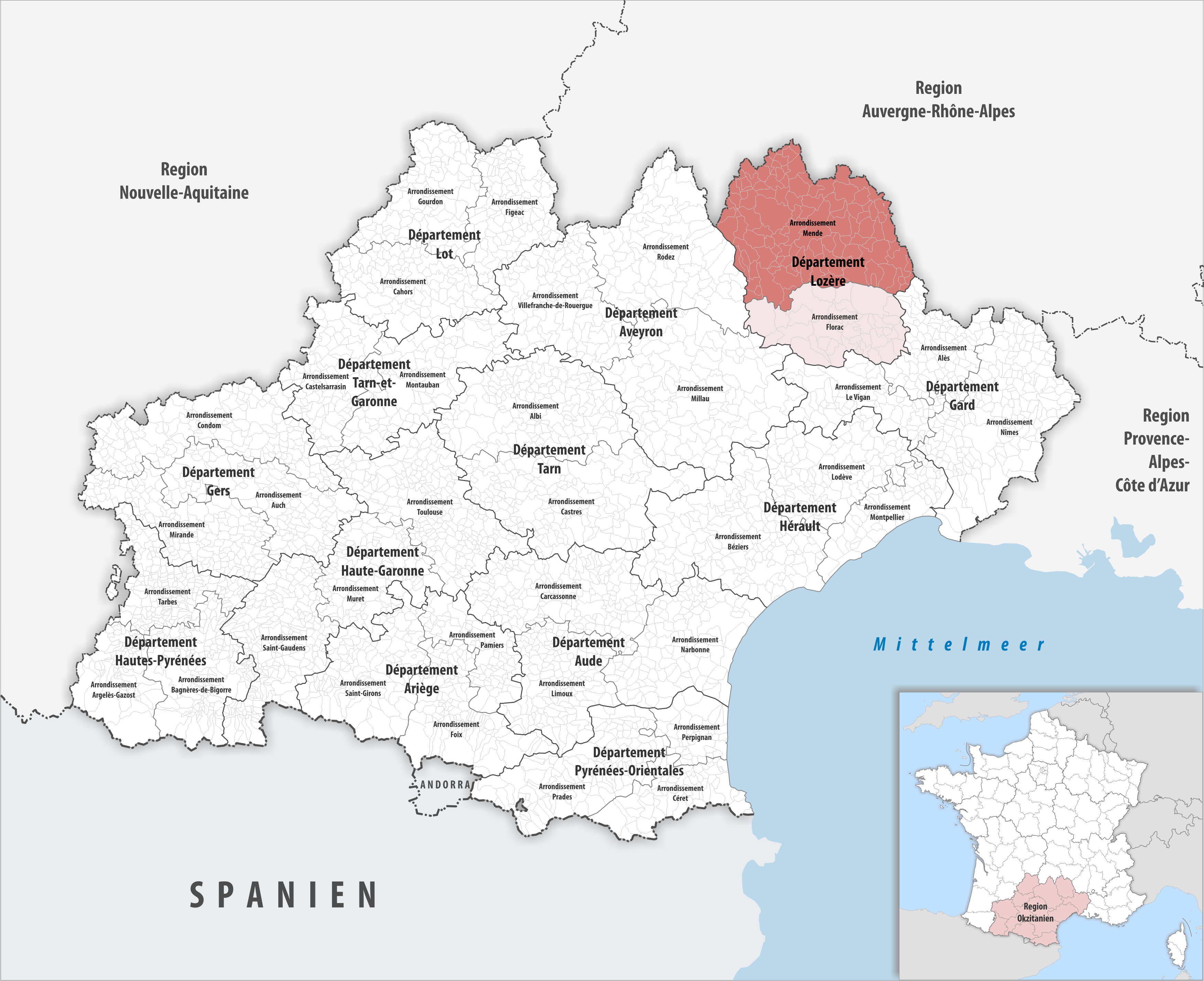 Lage des Arrondissements Mende